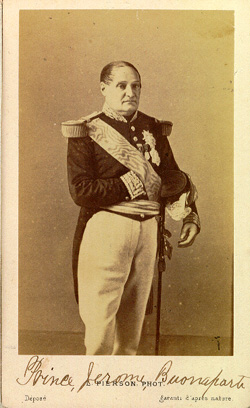 Jérôme Bonaparte (1784-1860)